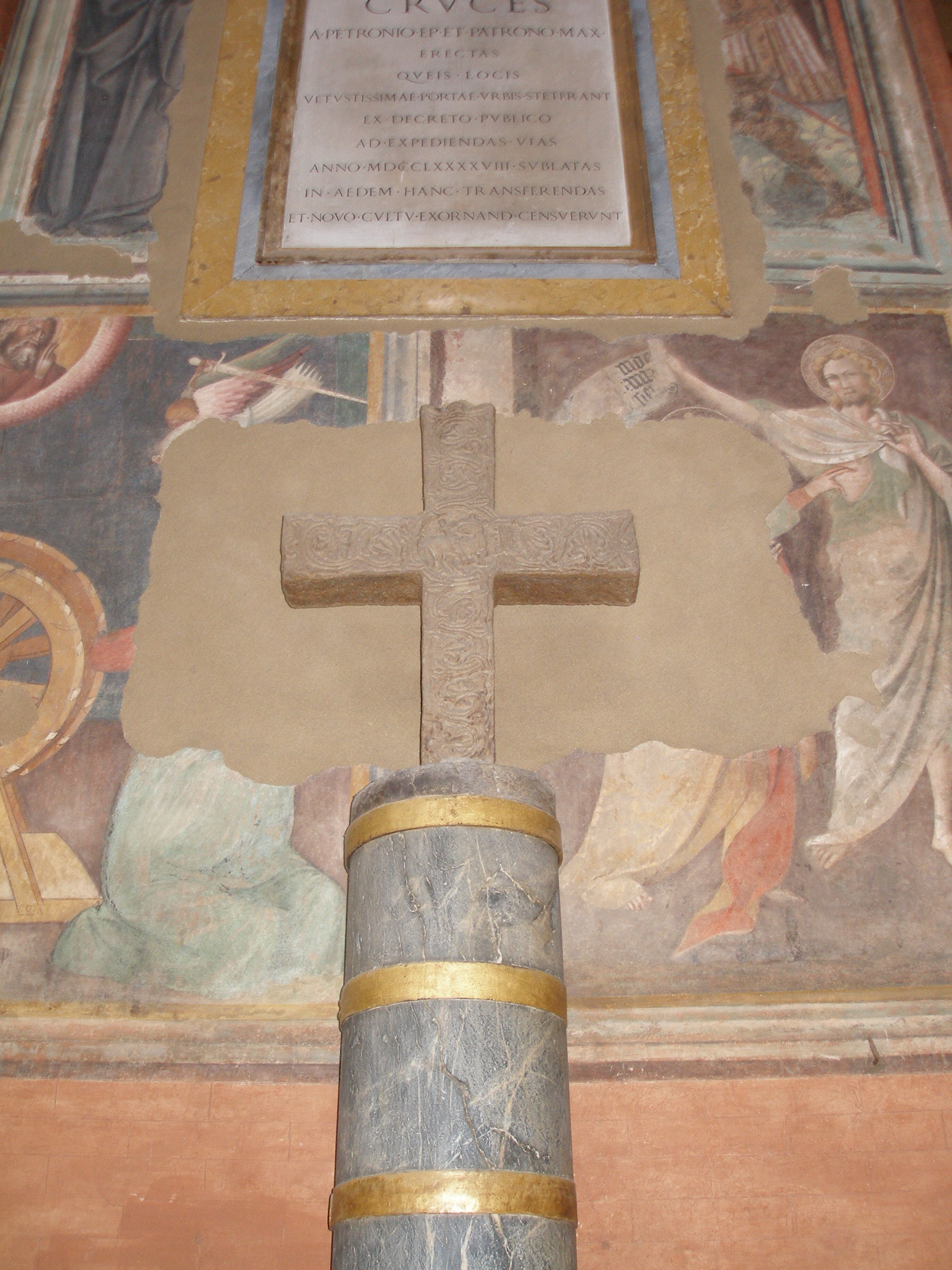 Bologna Dom